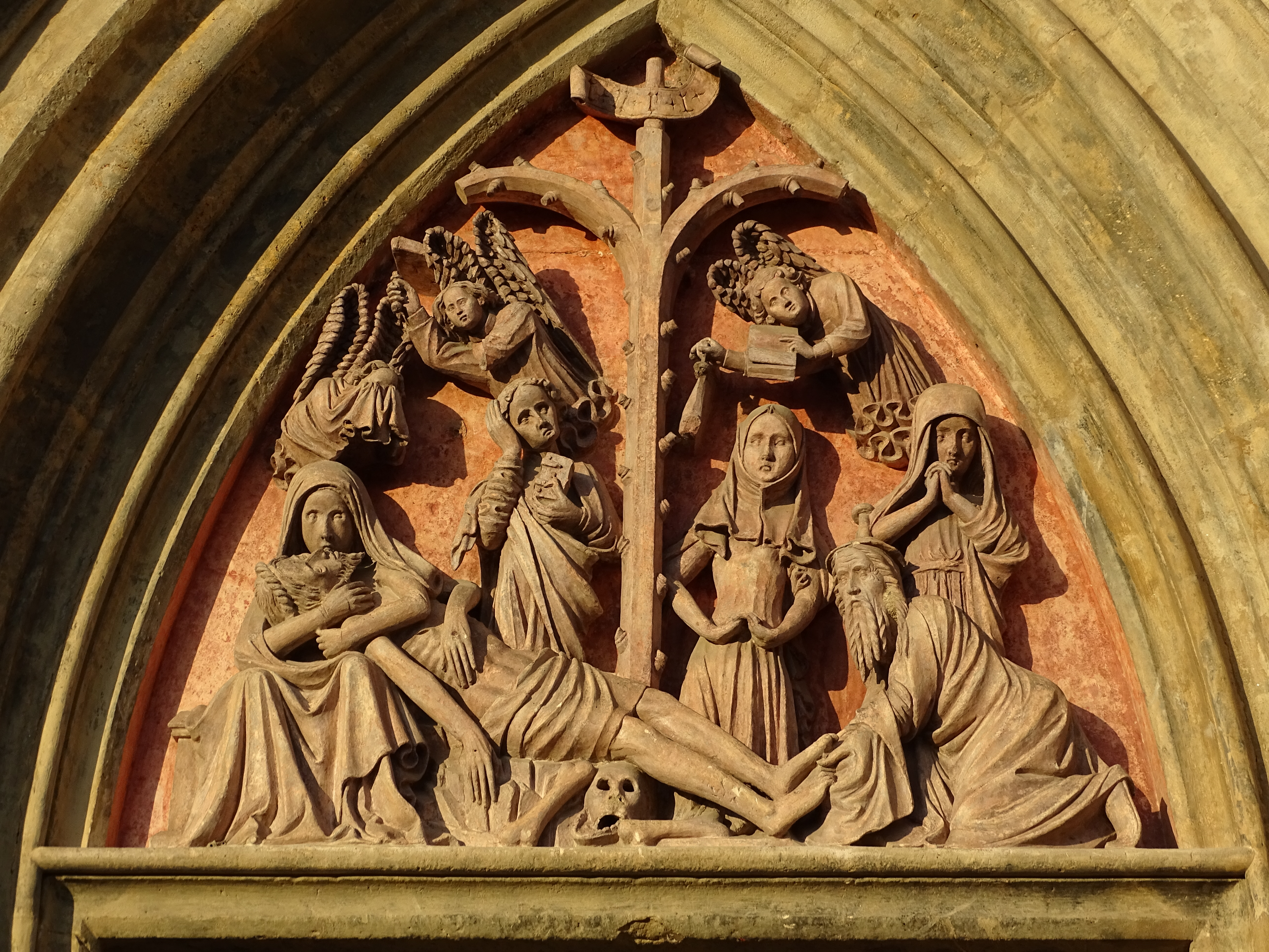 Der Tympanon des Südportals der Wallfahrtskirche Maria Straßengel welcher die Beweinung Christi zeigt.